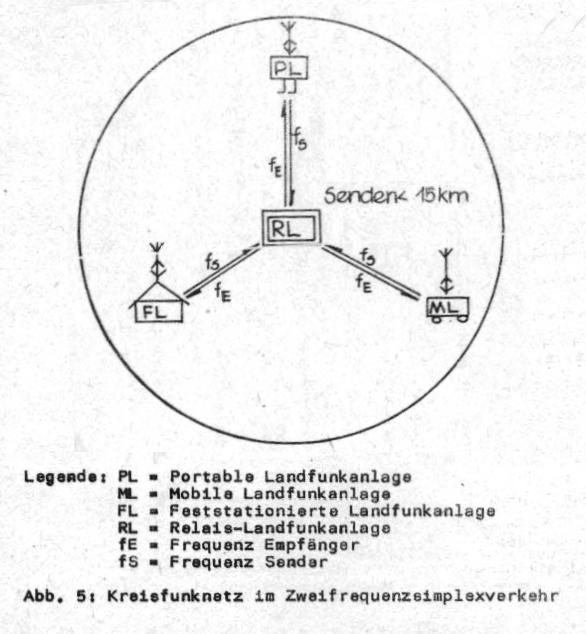 Funknetzplanung in der ehemaligen DDR